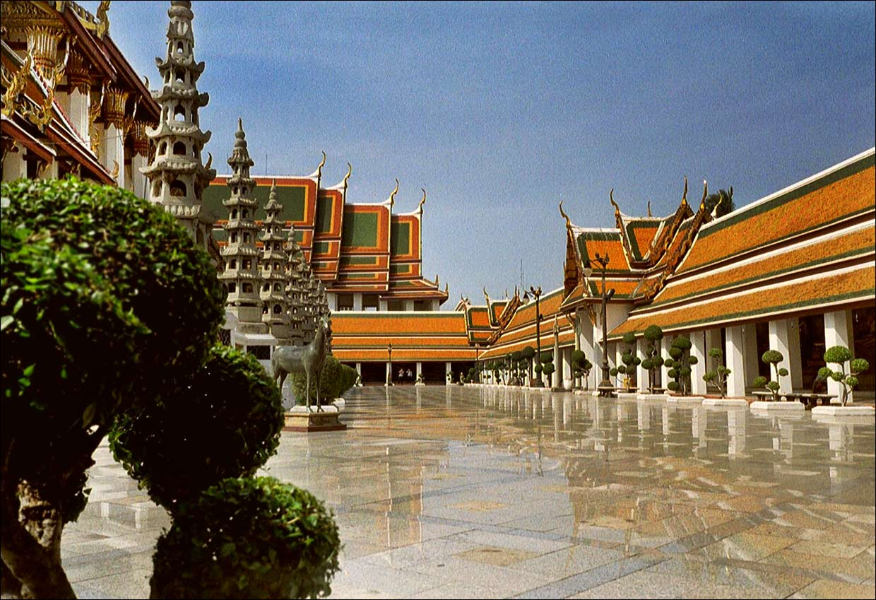 Galerie (Phra Rabieng) im Wat Suthat, Bangkok, eigenes Foto 2004 Lizenz/Quelle: (H. Damm), August 2004 buddistisch